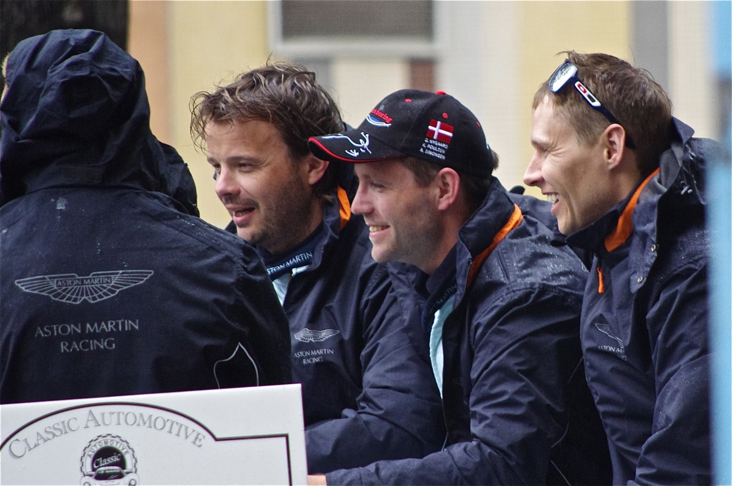 De gauche à droite : Kristian Poulsen, Christoffer Nygaard et Allan Simonsen